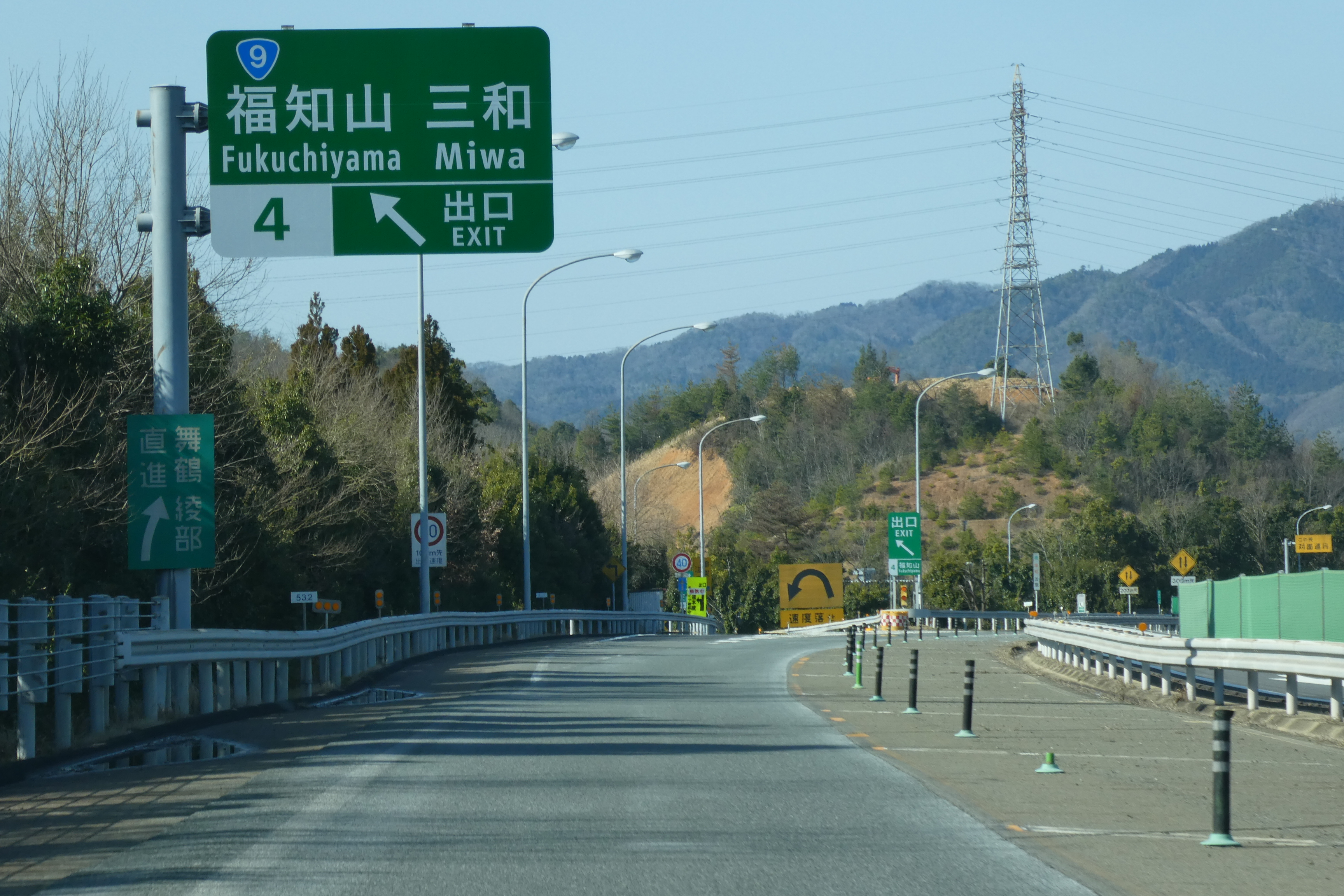 舞鶴若狭自動車道 福知山インターチェンジ